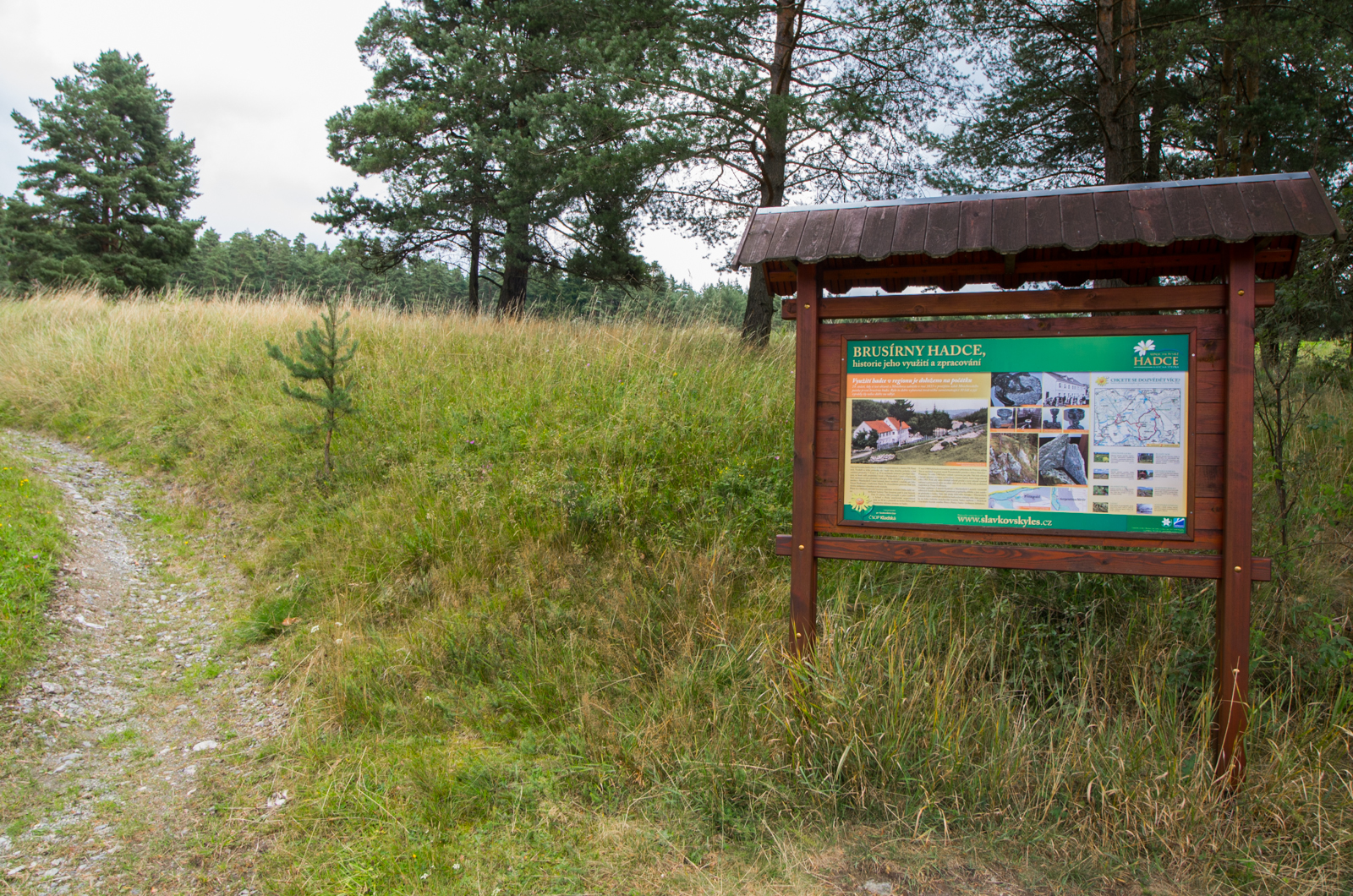 Národní přírodní rezervace Pluhův bor v CHKO Slavkovský les, západní okraj rezervace - infotabule u Naučné stezky Mnichovské hadce